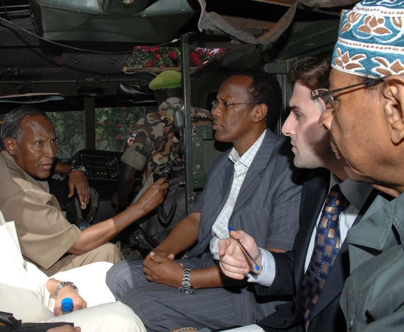 جولة في شوارع مقديشو مع الرئيس الصومالي عبدالله يوسف احمد ورئيس الوزراء محمد جيدي بسيارة مصفحة تابعة لقوات السلام الافريقية في الطريق لحضور جلسة للحكومة الصومالية المؤقتة